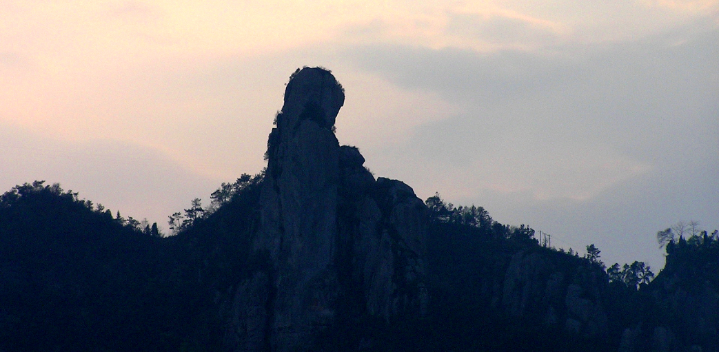 中文（中国大陆）: 石大人远景（摄影者：云中漫步）